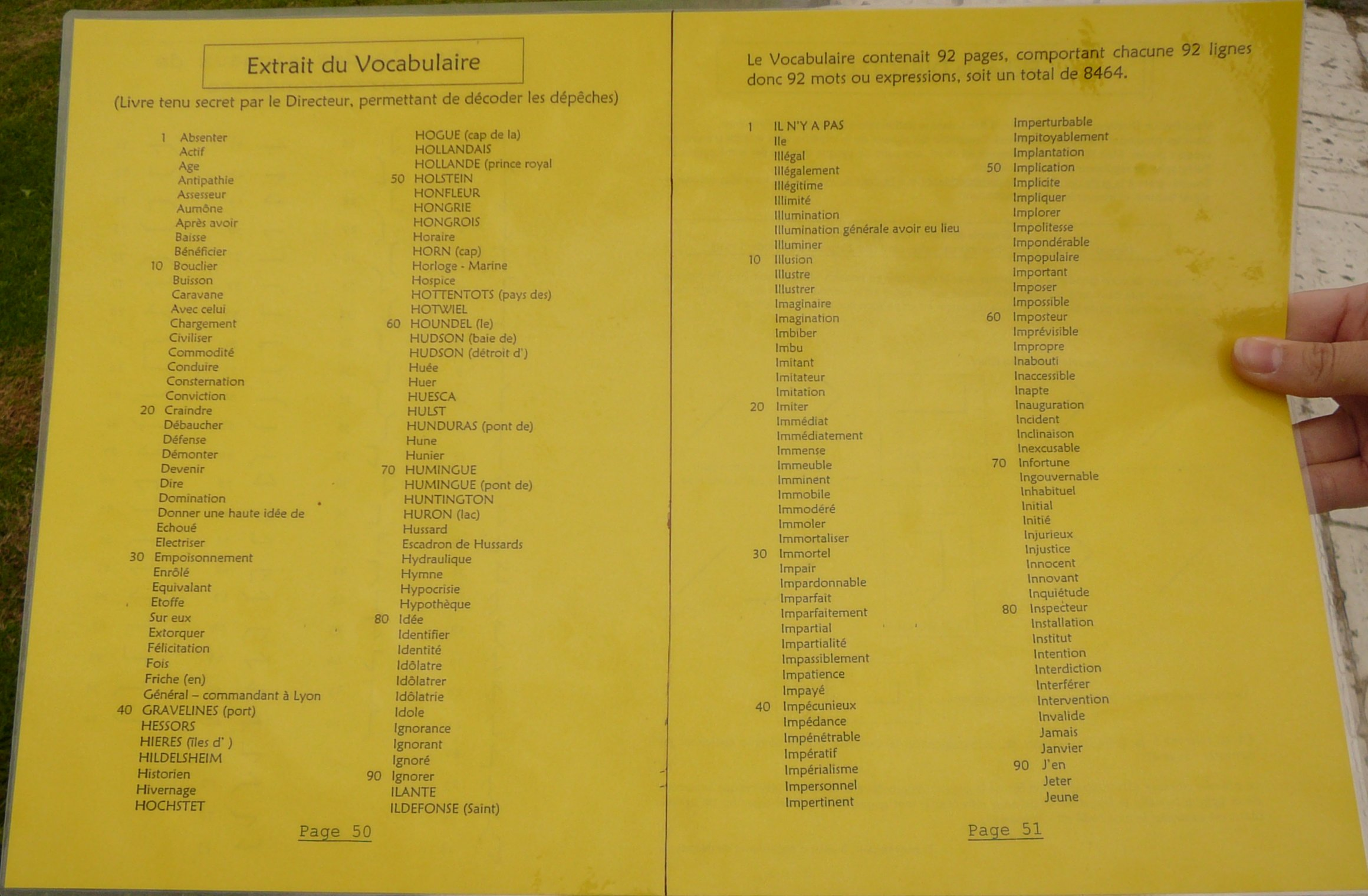 Télégraphe de Chappe, extrait du vocabulaire, musée de Saint-Marcan